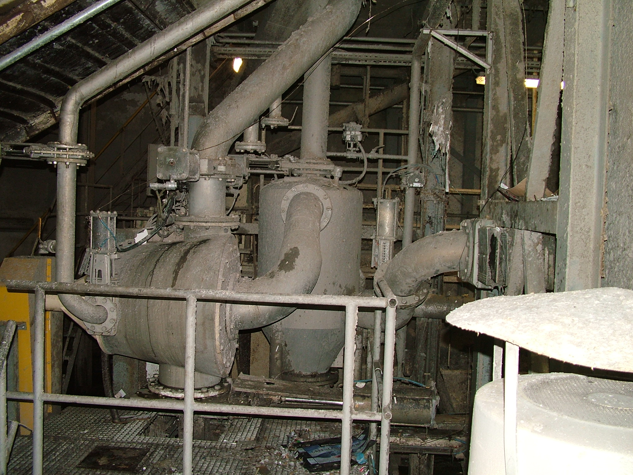 Secundairpulper